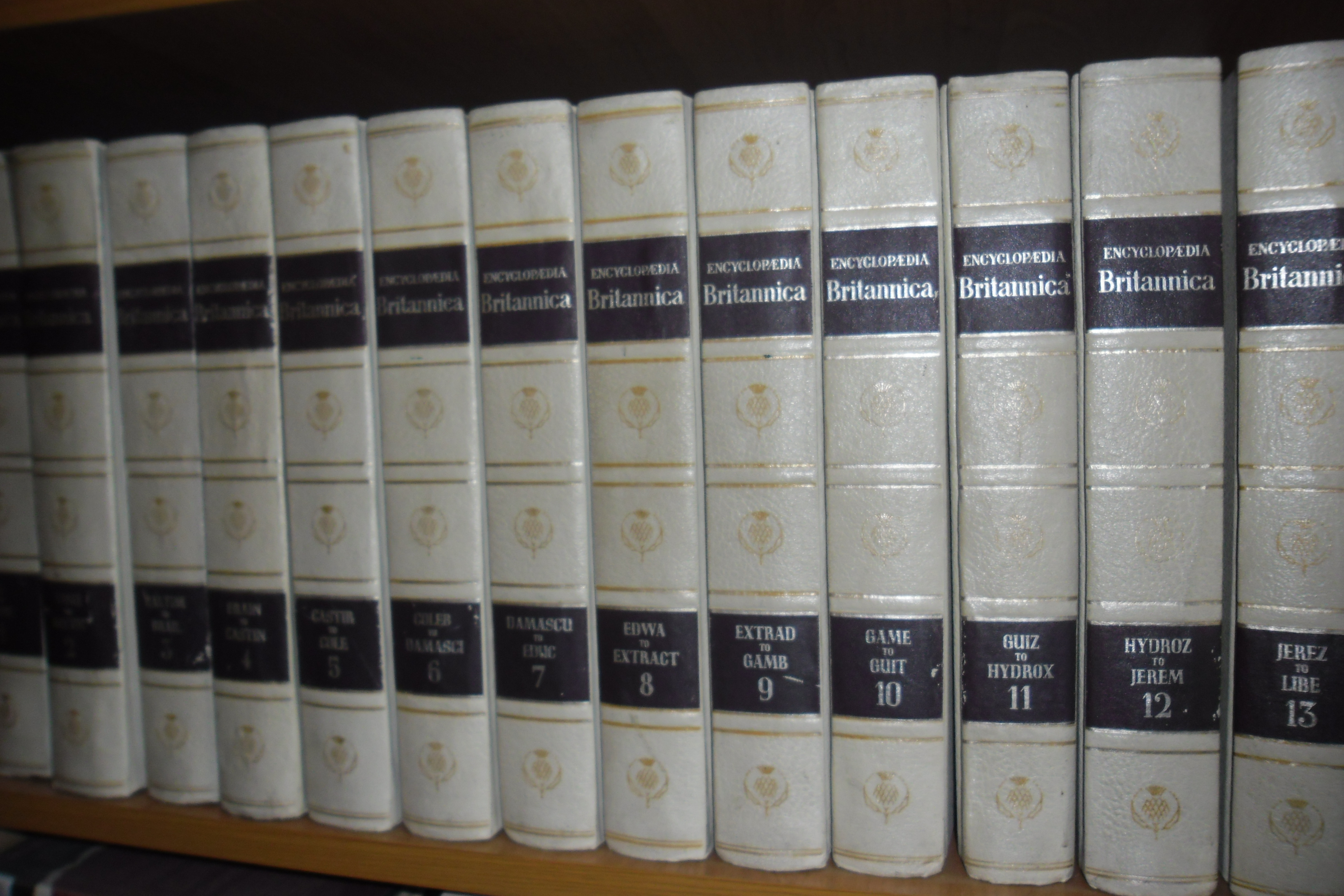 Фото